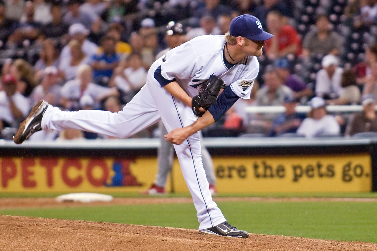 Sean Henn